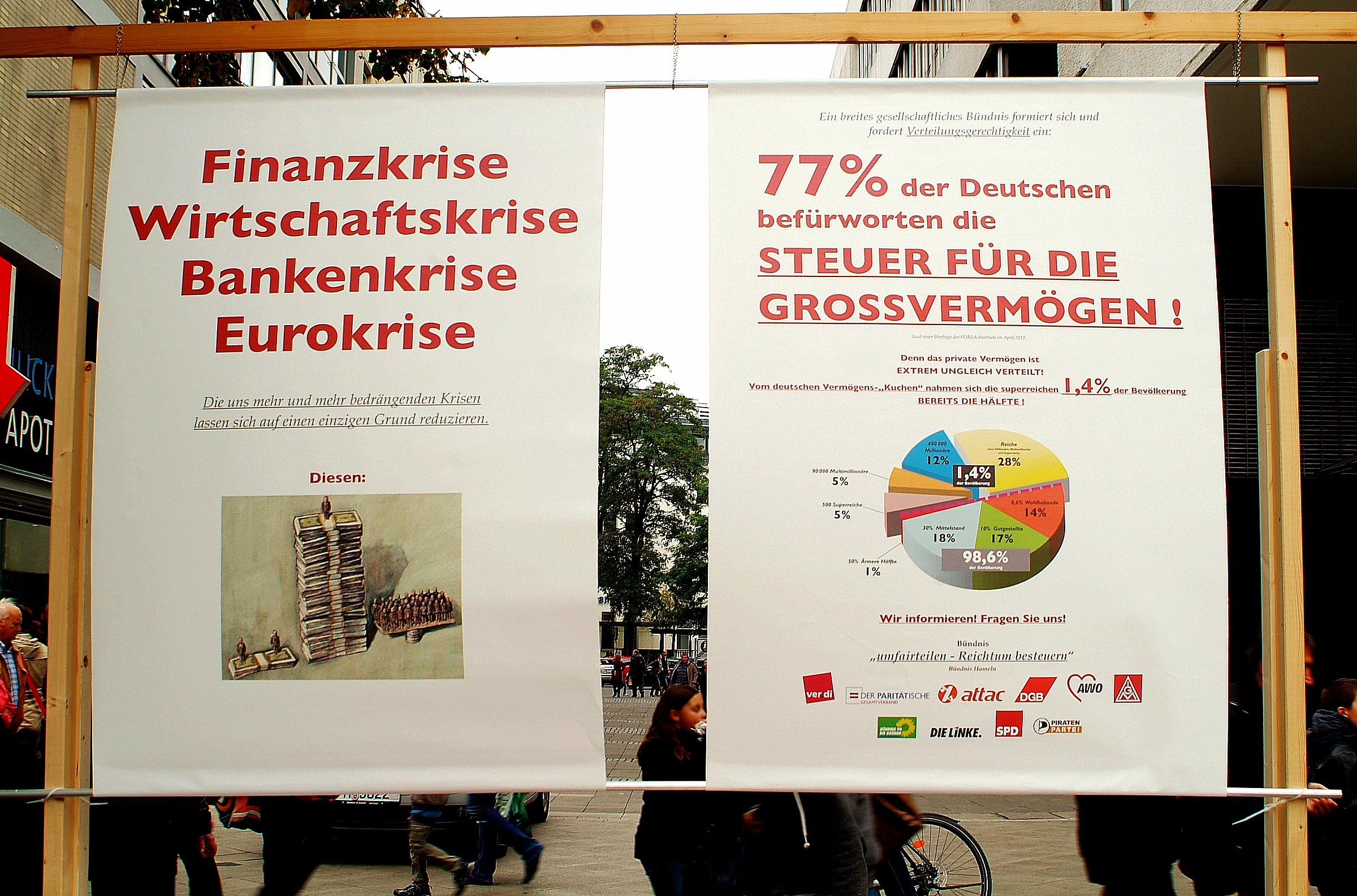 Diese beiden Transparent zeigen bildhaft die Ursachen der Finanzkrise, Wirtschaftskrise, Bankenkrise und Eurokrise, und stellt die Behauptung auf, 77% der Deutschen würden die Steuer für die Grossvermögenden befürworten; gesehen 2012 in der Georgstraße in Hannover während des bundesweiten Aktionstages "UMfairTEILEN - Reichtum besteuern' ...